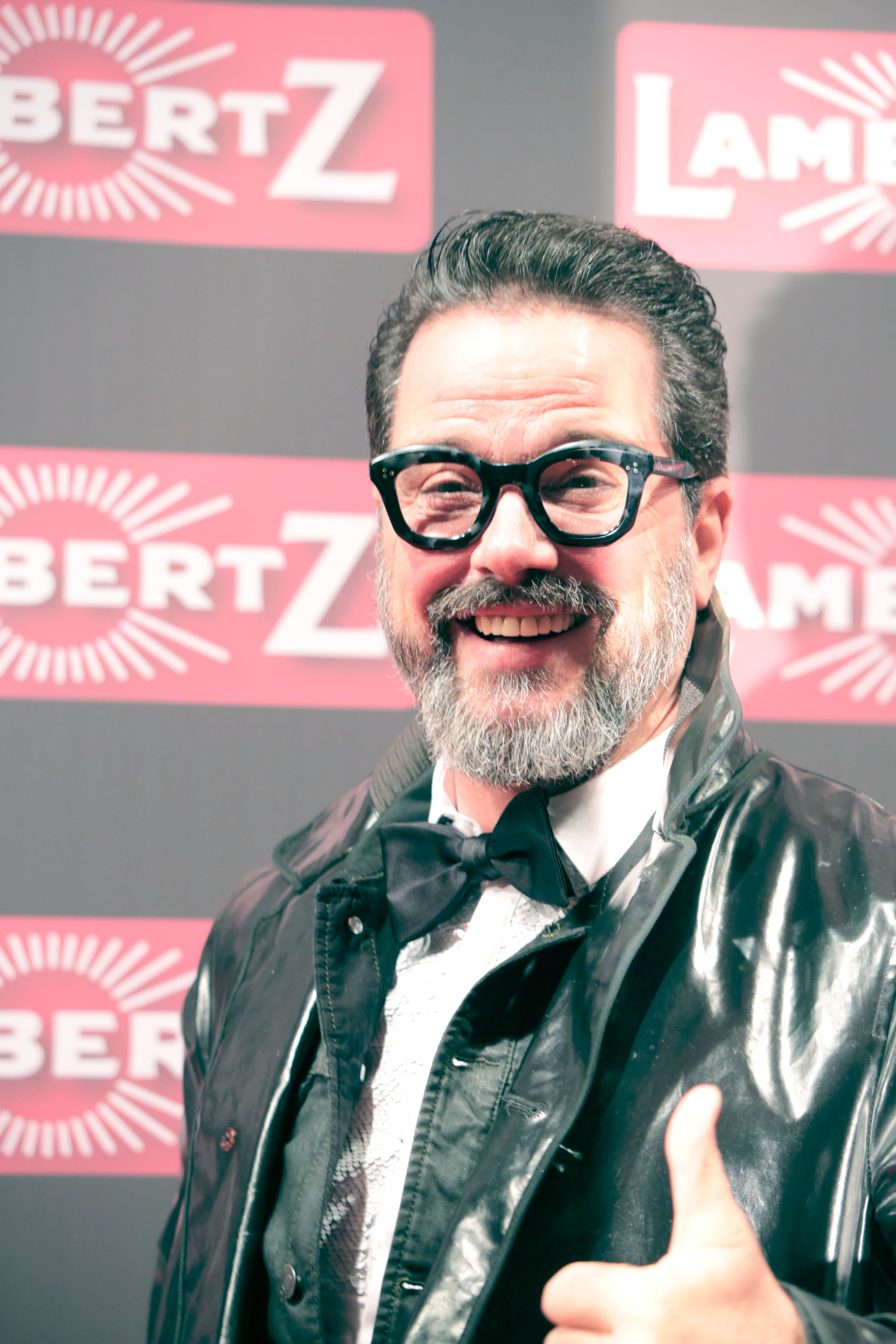 Alex Jolig bei der Lambertz Monday Night 2018.